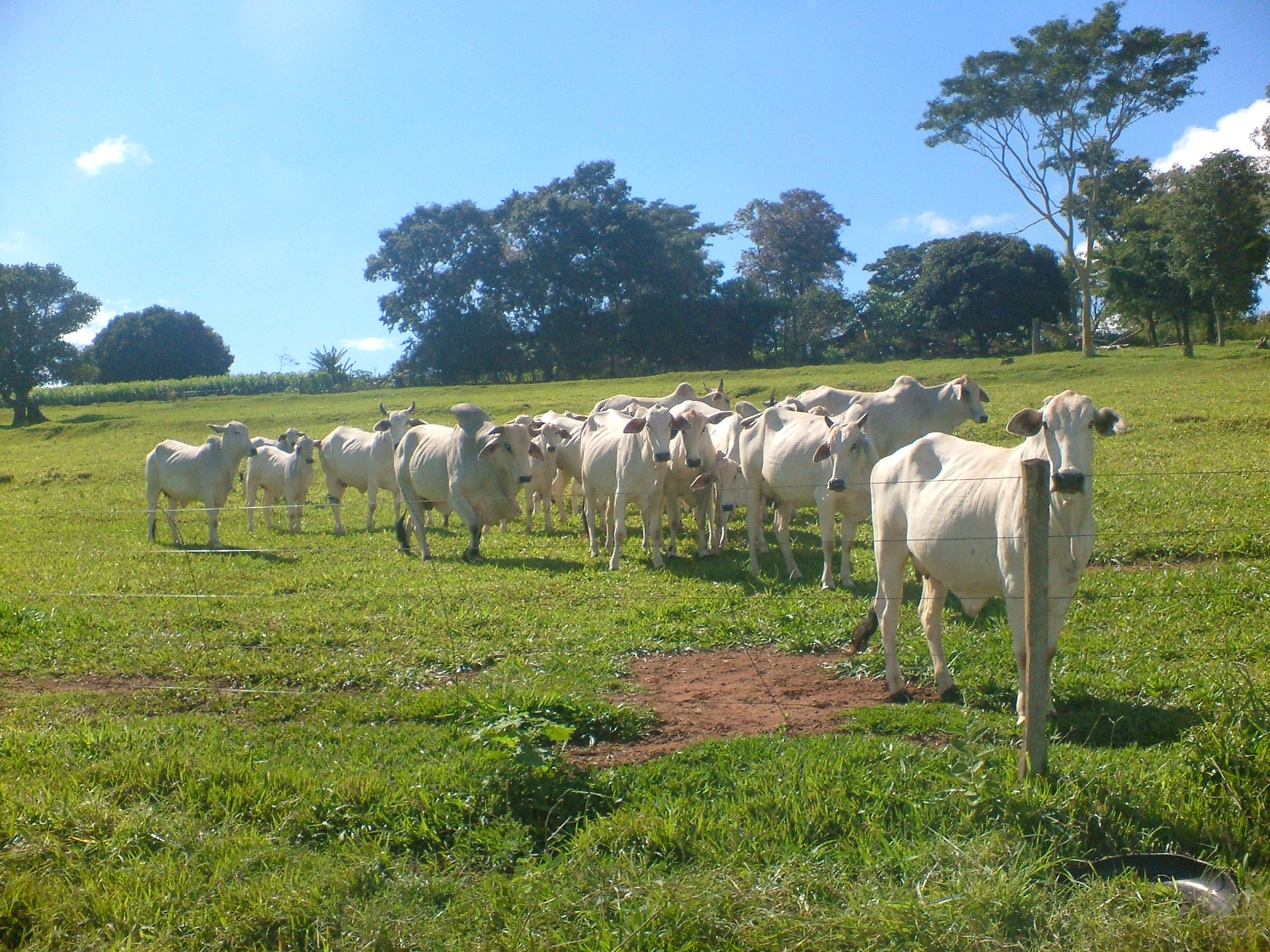 Criacao de Gado Nelore da familia Leite